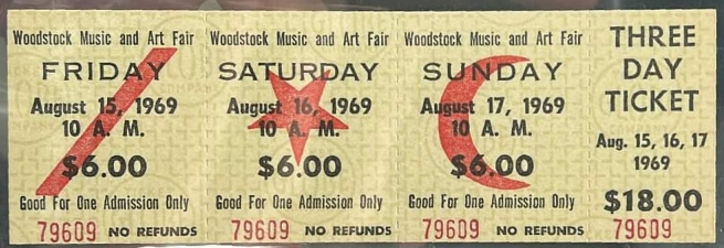 Eintrittskarten für das Woodstock-Festival, 15.–17. August 1969; Papier, 5,5 x 15,5 cm rock n popmuseum, Gronau, Germany